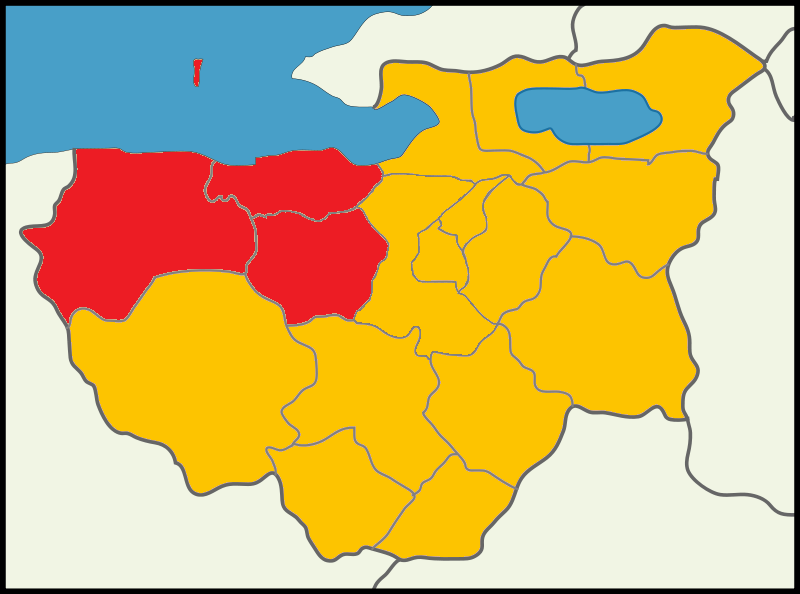 Bursa'da 2014 Türkiye cumhurbaşkanlığı seçimi